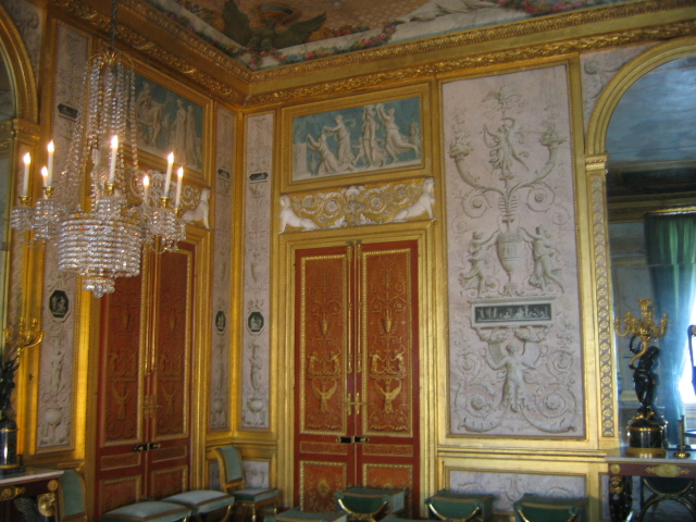 Grand salon de l'impératrice au château de Fontainebleau